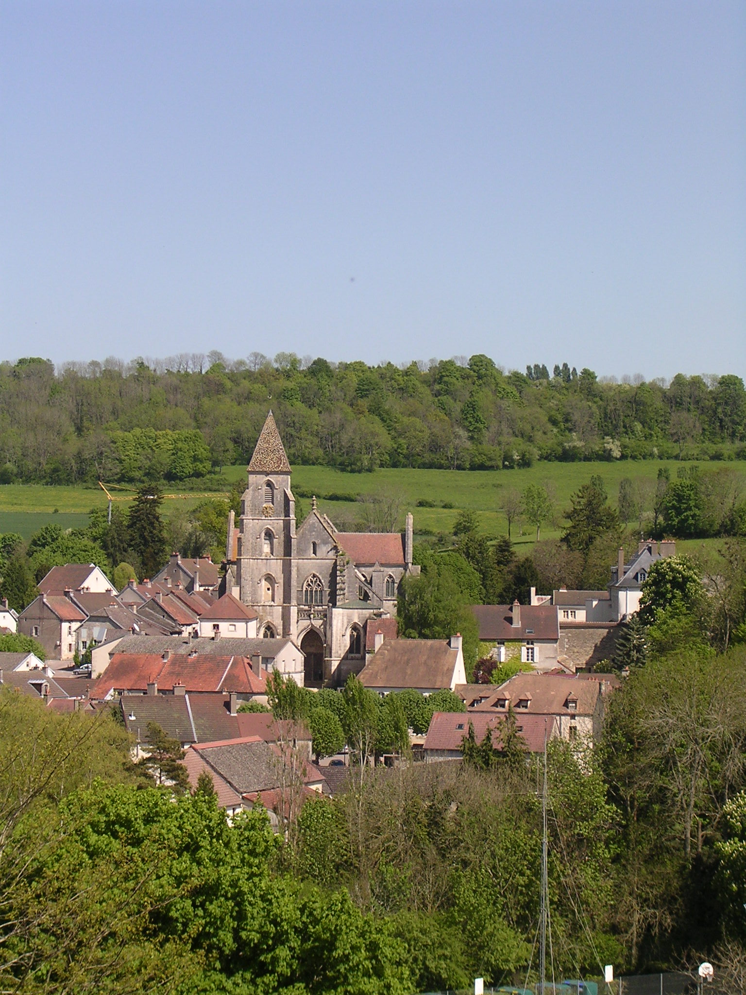 Saint-Seine-l'Abbaye, vue générale du village